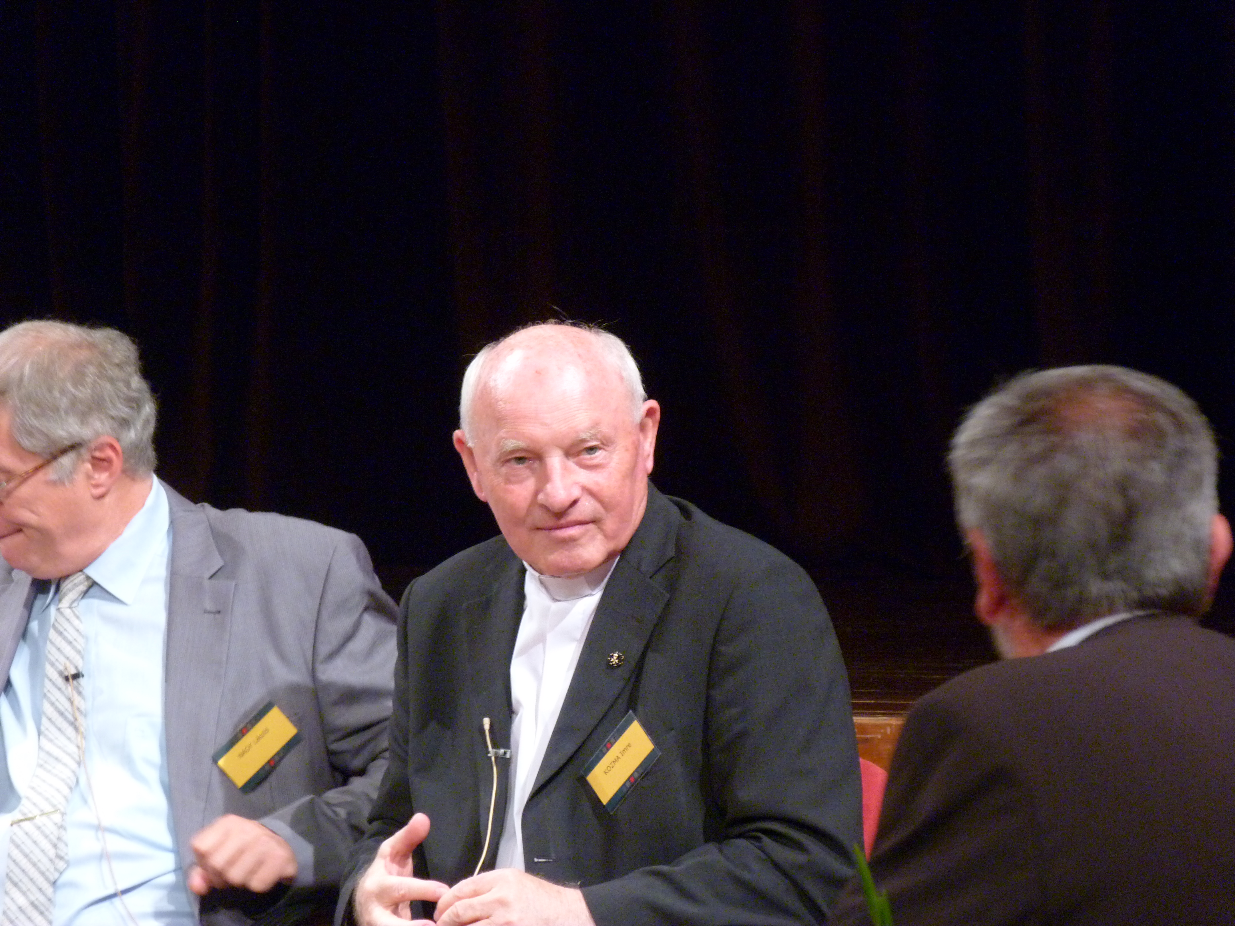 A felvétel 2014. augusztus 18-án, hétfőn készült Sopronban. Kapu a szabad Európa felé. 25 éves a Páneurópai Piknik. Konferenciát szervezett a Polgári Magyarországért Alapítvány a Konrad Adenauer Alapítvánnyal, az Antall József Tudásközponttal, a Páneurópai Piknik '89 Alapítvánnyal, Sopron Városával. Kozma Imre Magyar Máltai Szeretetszolgálat, Liszt Ferenc Kultúrális Központ